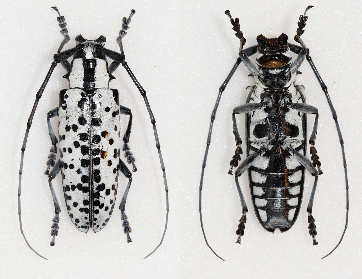 Bates,1869 Sex: Female Data: 04-2012 - Heredia - Sarapiqui - Costa Rica Size: 34mm